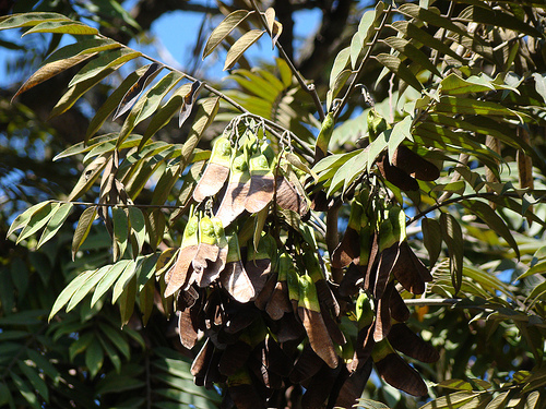 jacaranda paulista (Machaerium villosum), folhas e legumes. parque ceret sao paulo, Brazil